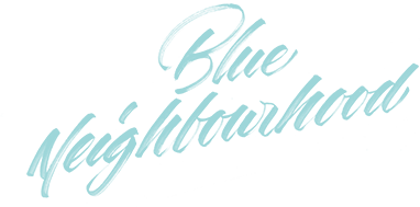 Logo de l'album.